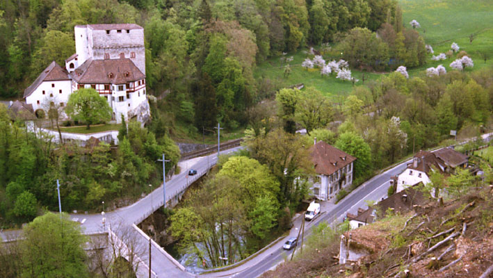 Schloss Angenstein, Uebersicht ueber die Gesamtanlage mit Schloss, Zolhaus und Wirtshaus sowie ENgnis und Brücke